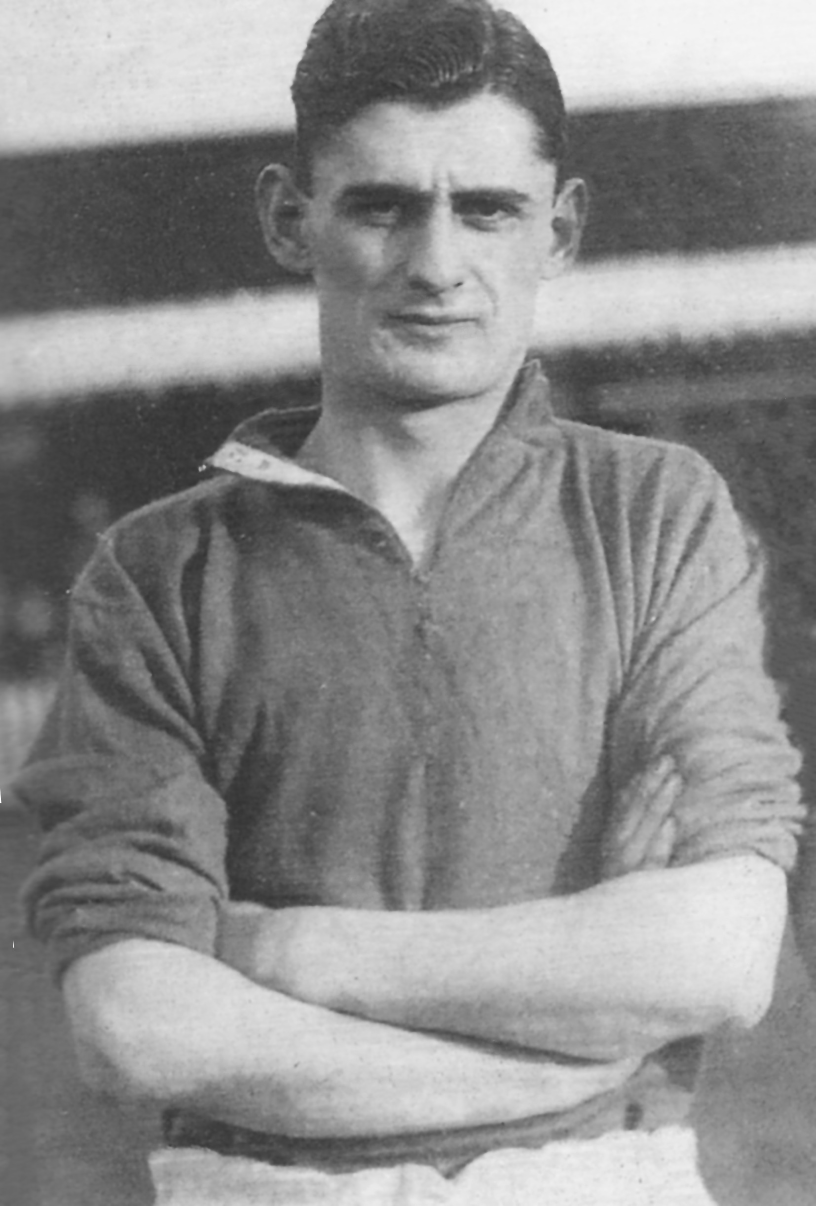 Bunny Bell